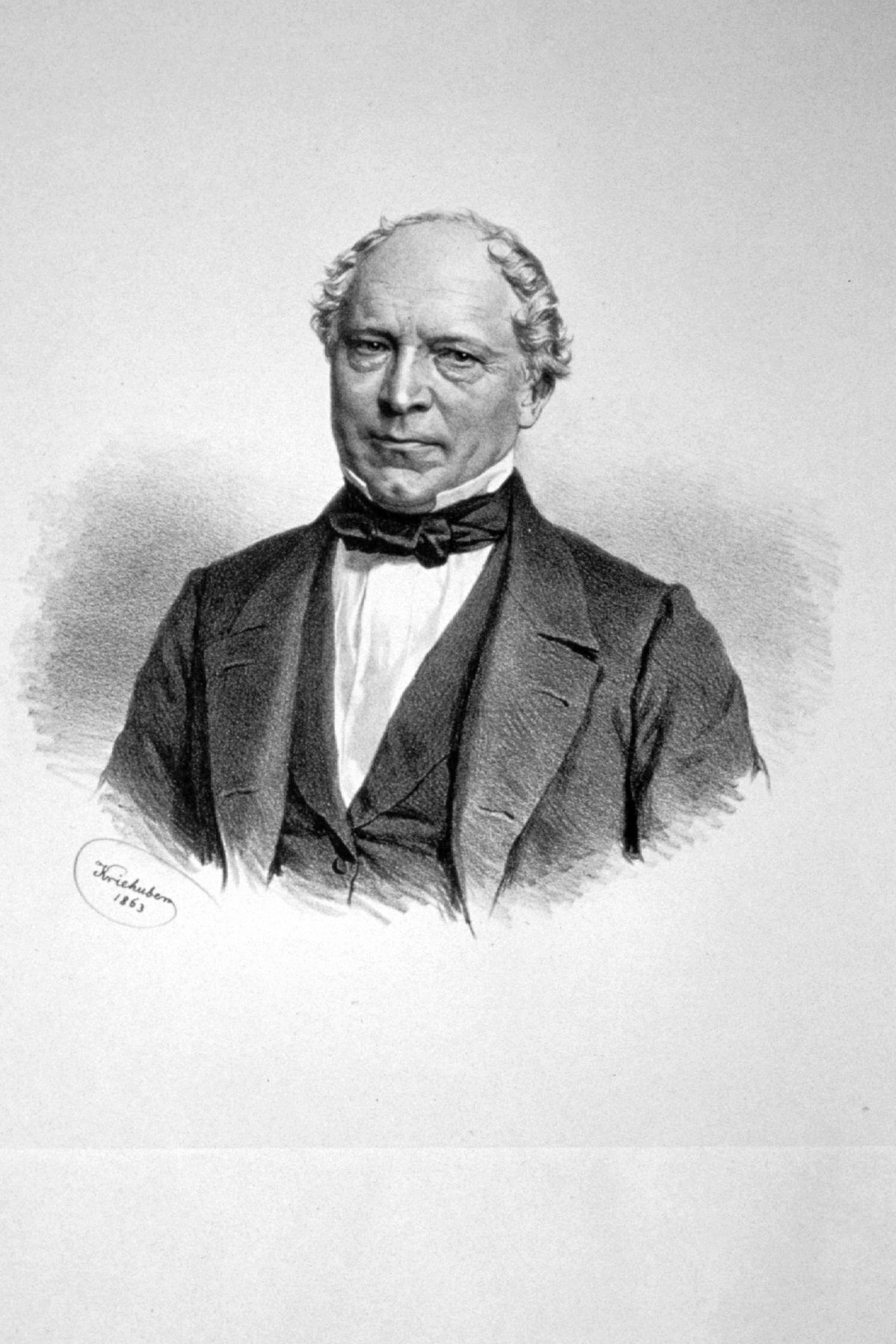 Ludwig von Förster (1797-1863), Architekt, Baumeister Lithographie von Josef Kriehuber, 1863